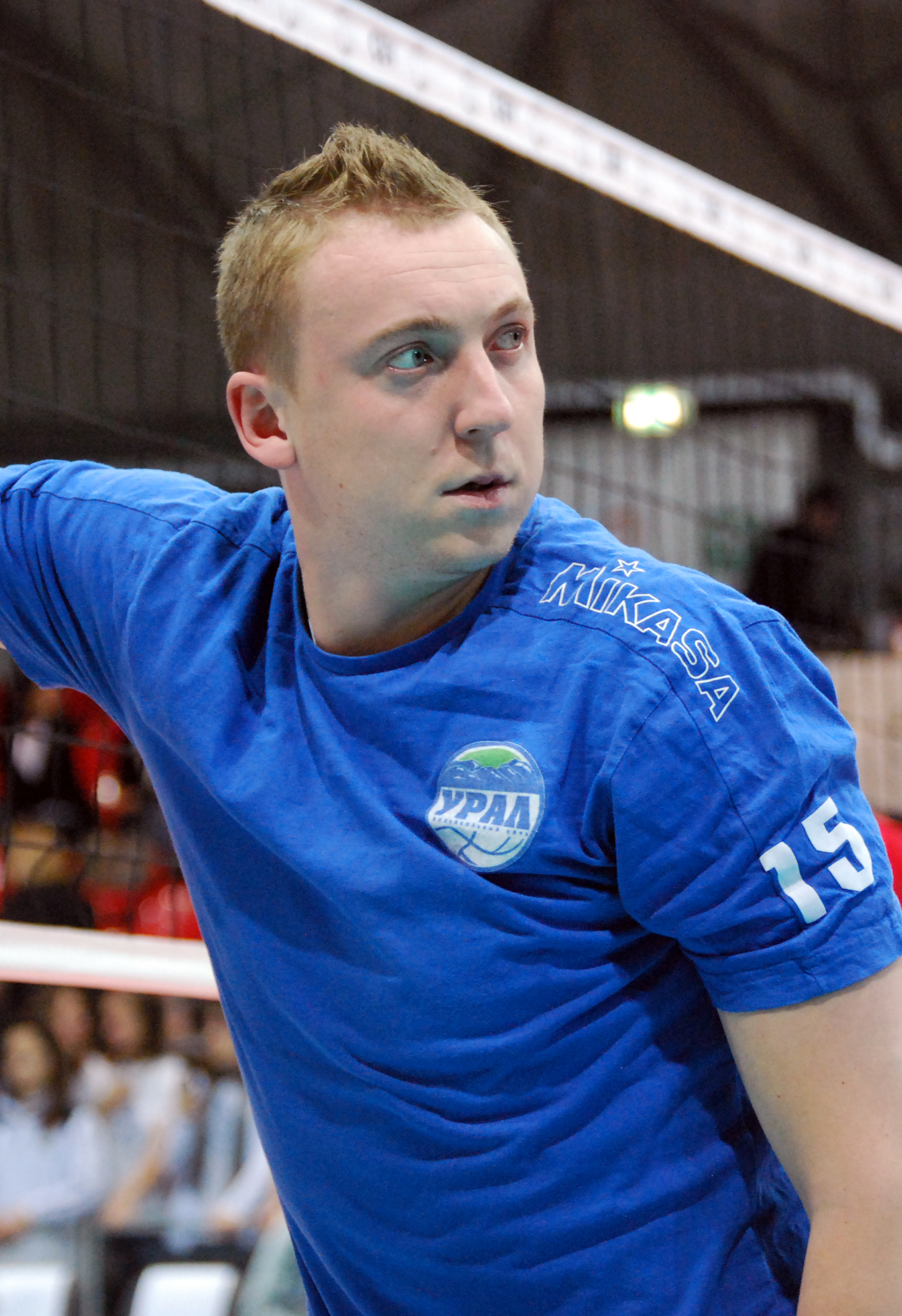 Aleksej Spiridonov